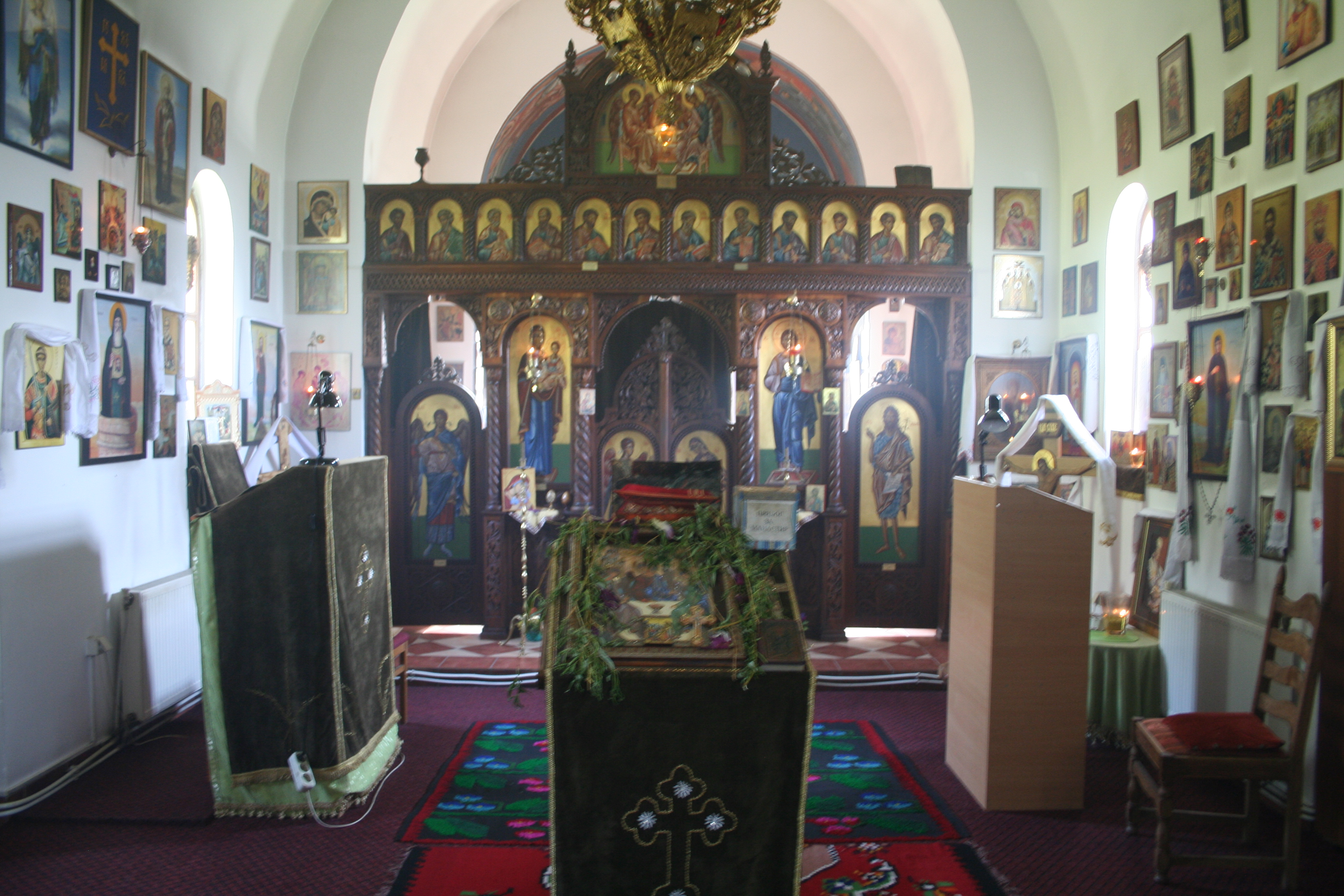 Manastir Bjele vode